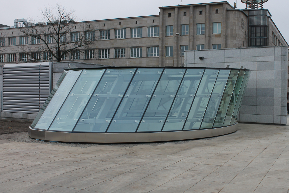 Świetlik nad zachodnią halą odpraw stacji C13 Centrum Nauki Kopernik.